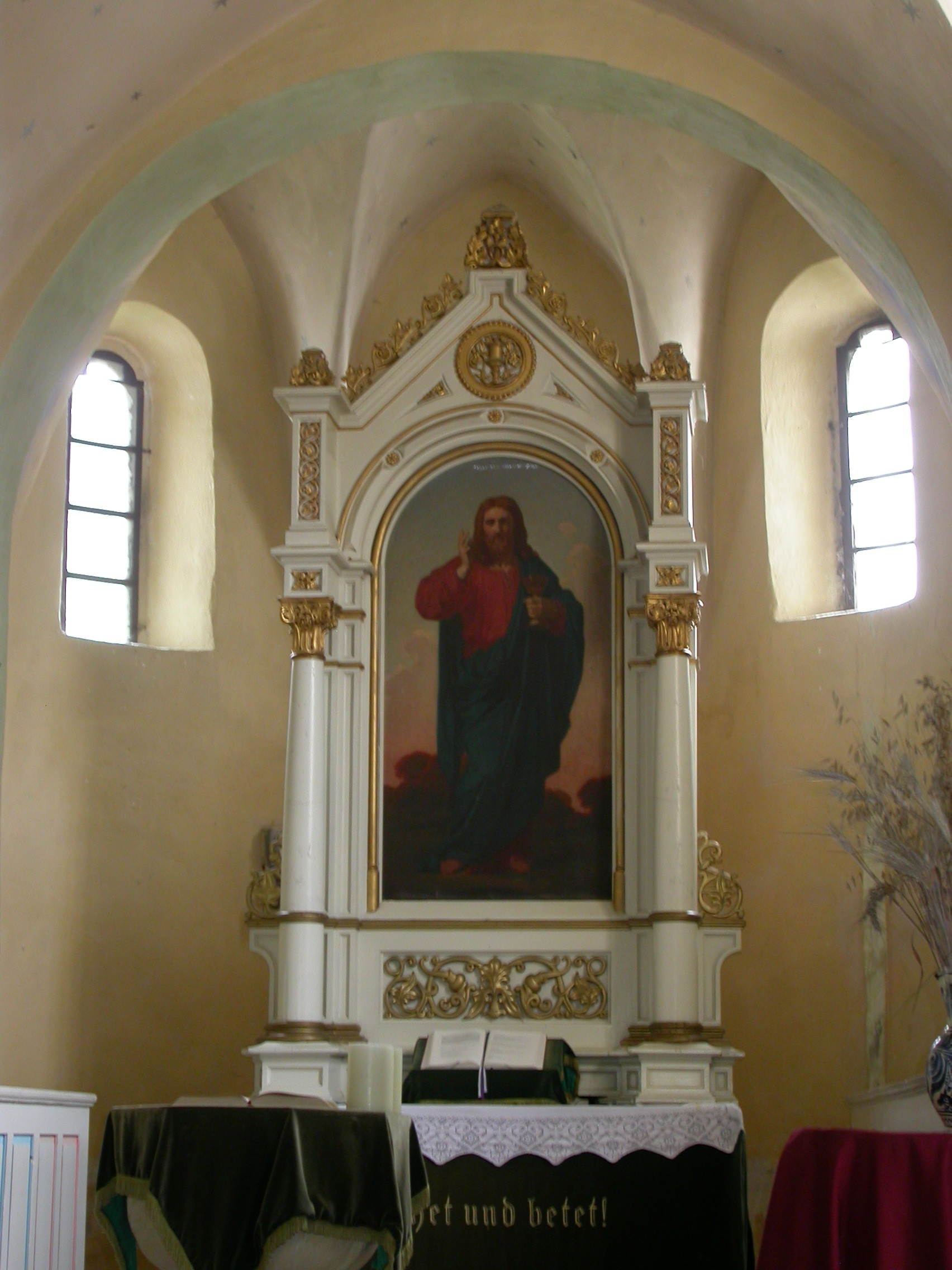 Ansamblul bisericii evanghelice, sec. XV - XVIII